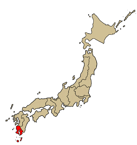 Mappa della diocesi cattolica di Kagoshima, in Giappone. Lavoro personale.